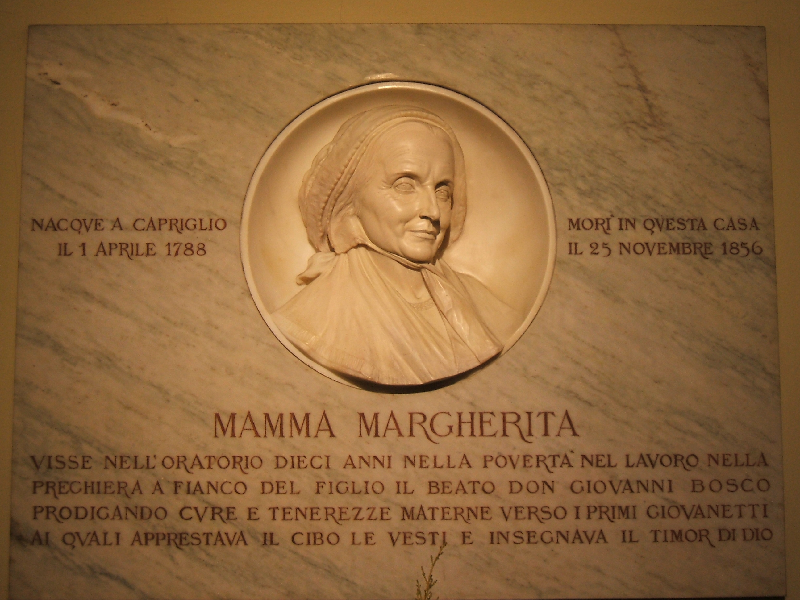 Targa in ricordo di Margherita Occhiena, madre di don Bosco (Torino, Valdocco)